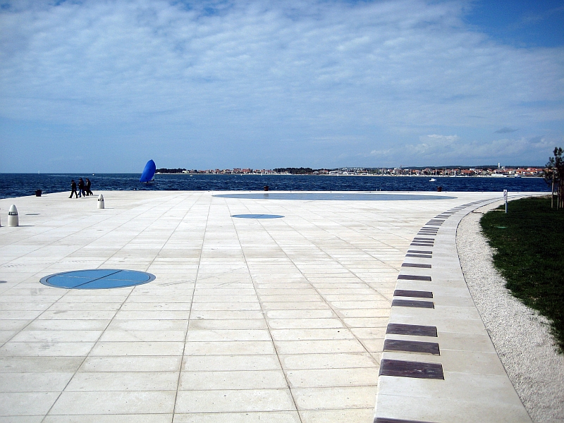 Monument der Sonne in Zadar / Kroatien / Adriatisches Meer